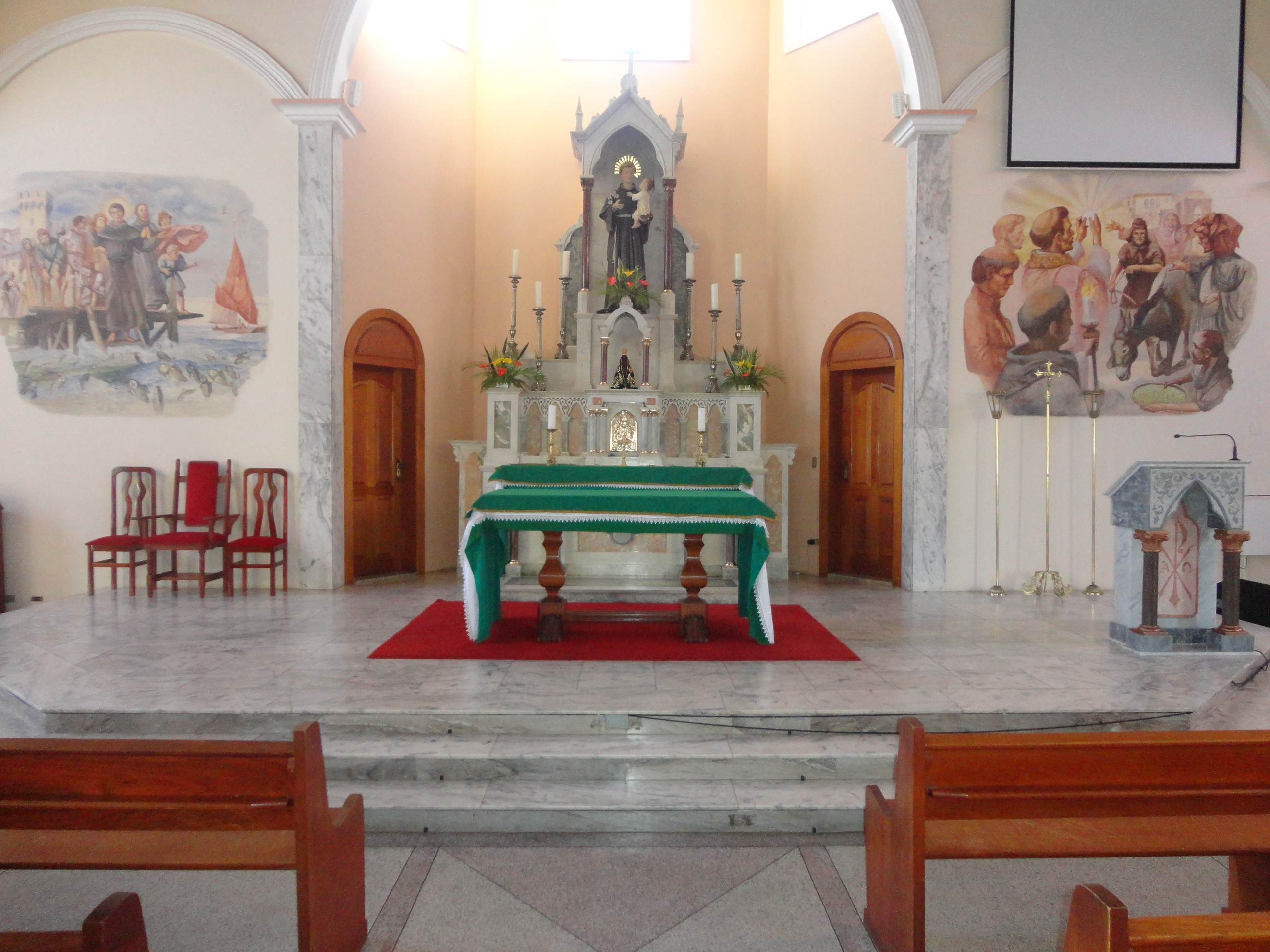 Igreja de Santo Antônio em Itatiba, visão da Rua Sto Antônio. Data 12/07/2013